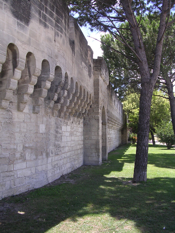 Remparts d'Avignon, Vaucluse, France